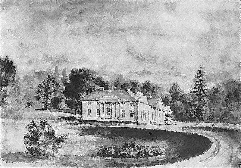 Палац Стадницьких. Стара Сенява